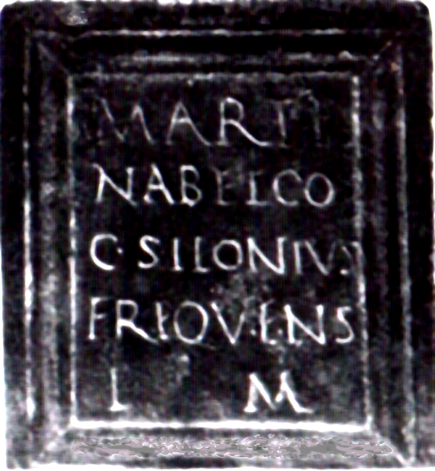 Inscription sur bronze à Mars Nabelcus